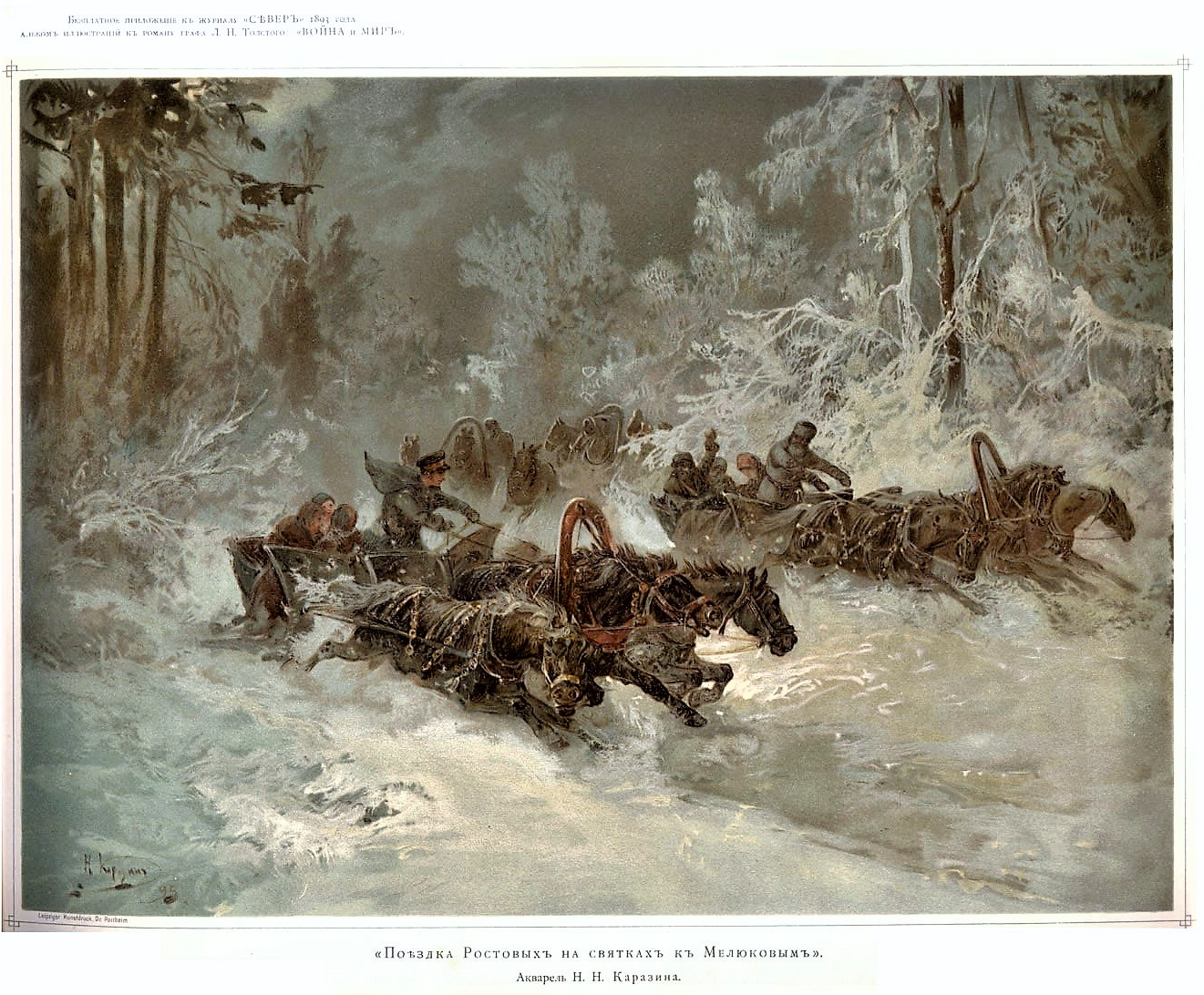 Поездка Ростовых на святках к Мелюковым (Война и мир) Акварель Н.Н. Каразина